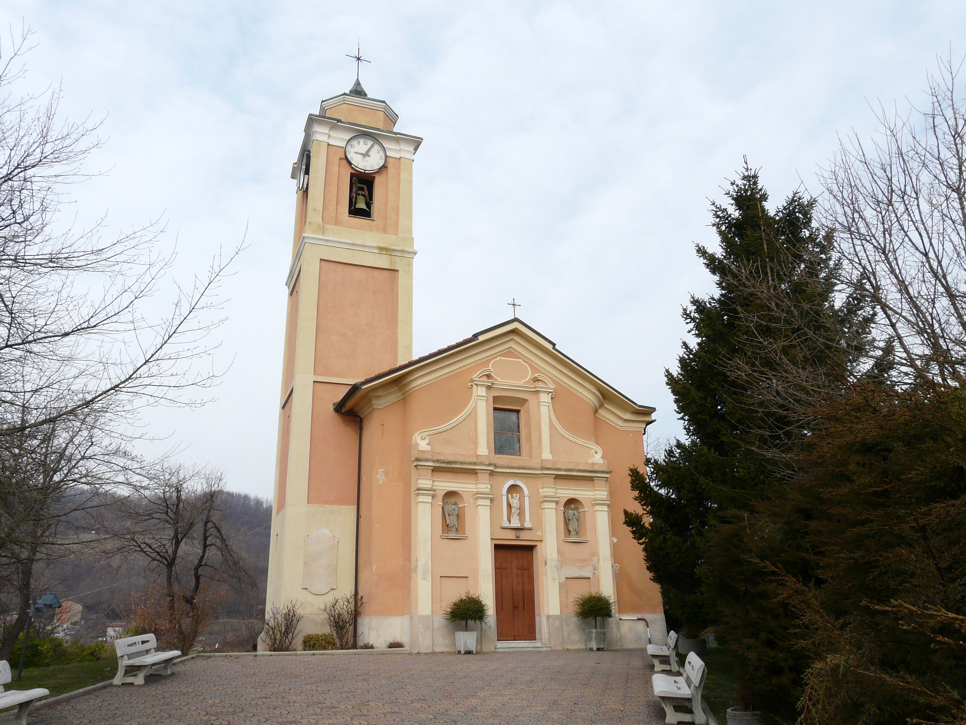 Chiesa di Sant'Andrea Apostolo, Plodio, Liguria, Italia.